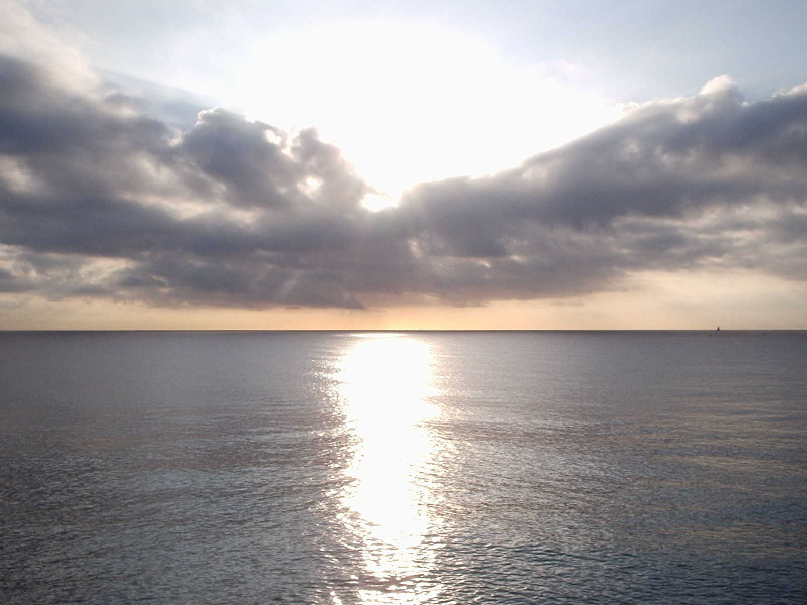 Mar Ligure, Bordighera, 2008